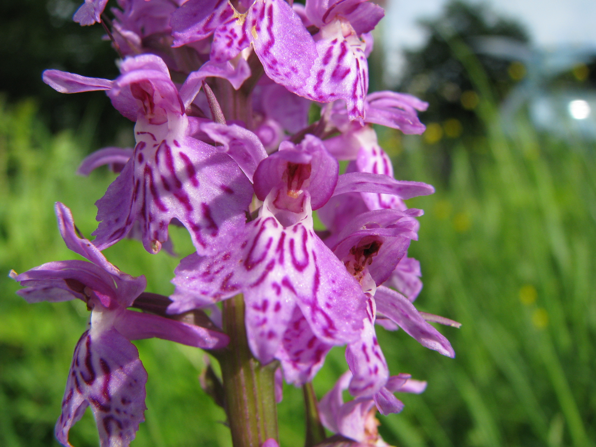 Fuchsova prstasta kukavica - Dactylorhiza fuchsii (Druce) Soo; Dactylorhiza maculata ssp. fuchsii (Druce).